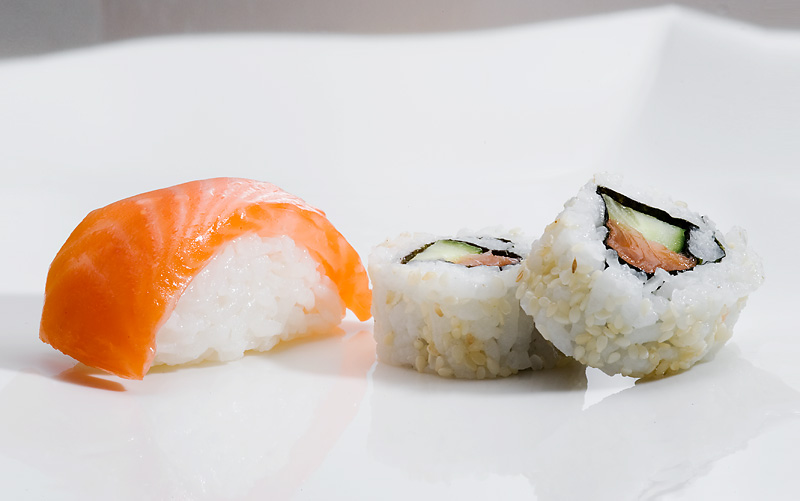 Eksempel på hjemmelaget nigirisushi og maki med laks.